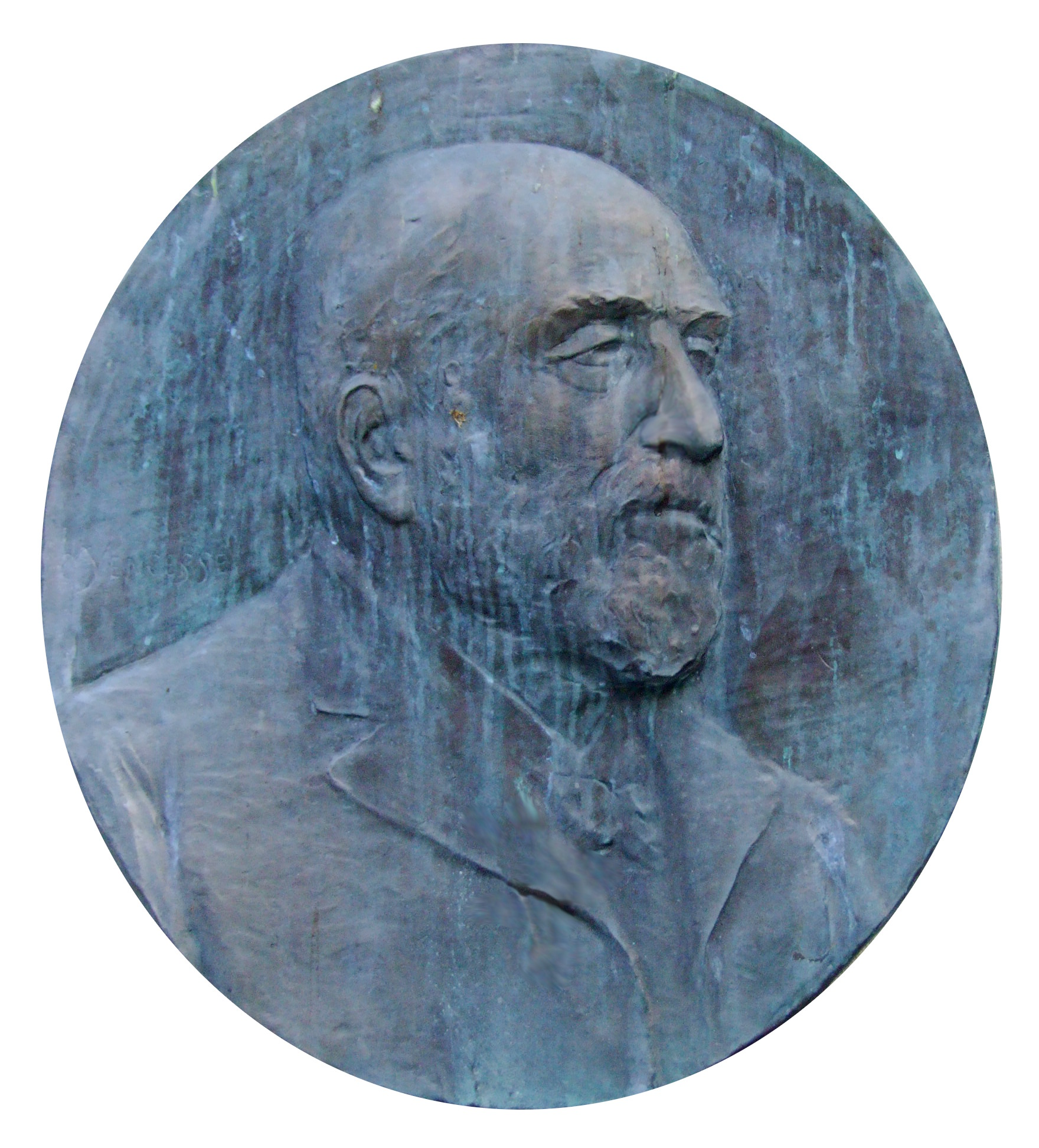 Henri Bazin, Médaillon de la fontaine de la place Saint Michel à Dijon, Dijon, Côte-d'Or, Bourgogne, FRANCE